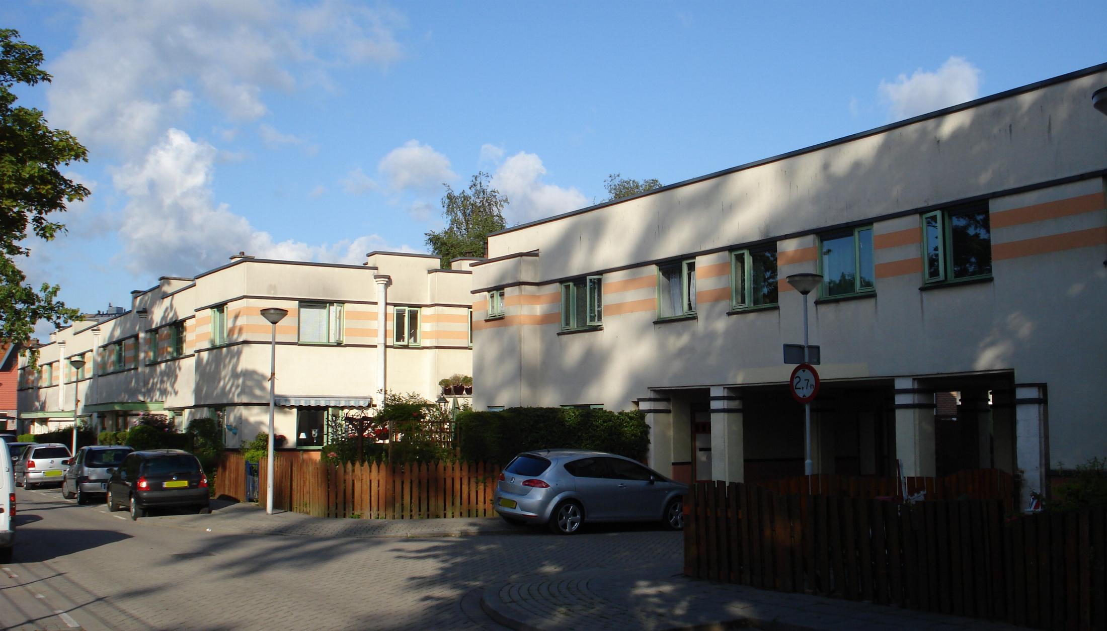 Rotterdam, Dubbelstraat 1-25. Gemeentemonument.